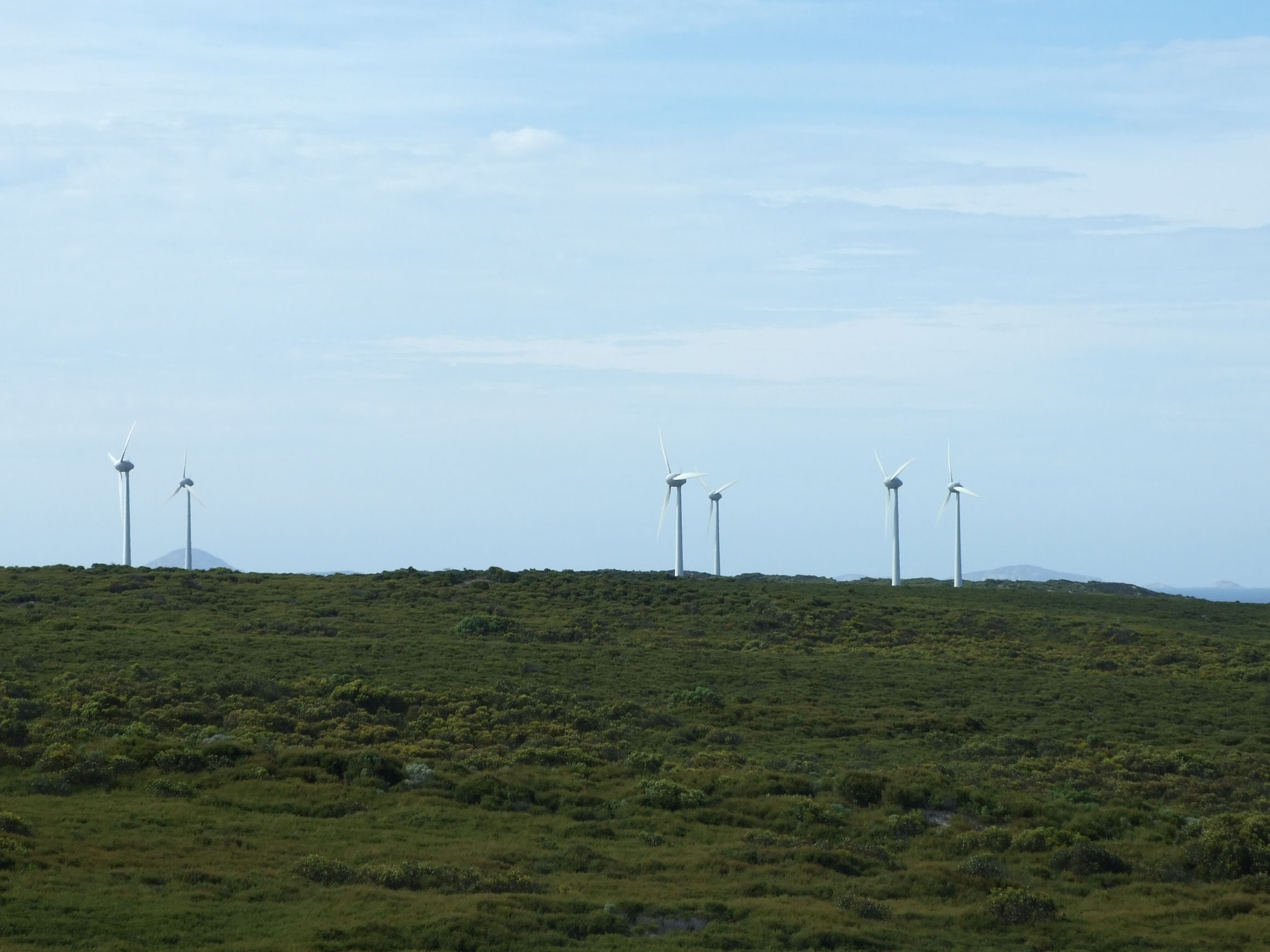 Ten Mile Lagoon Wind Farm, Western Australia